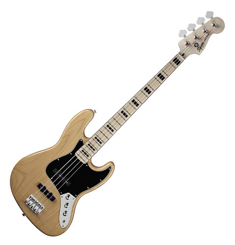 Squier Vintage Jazzbass